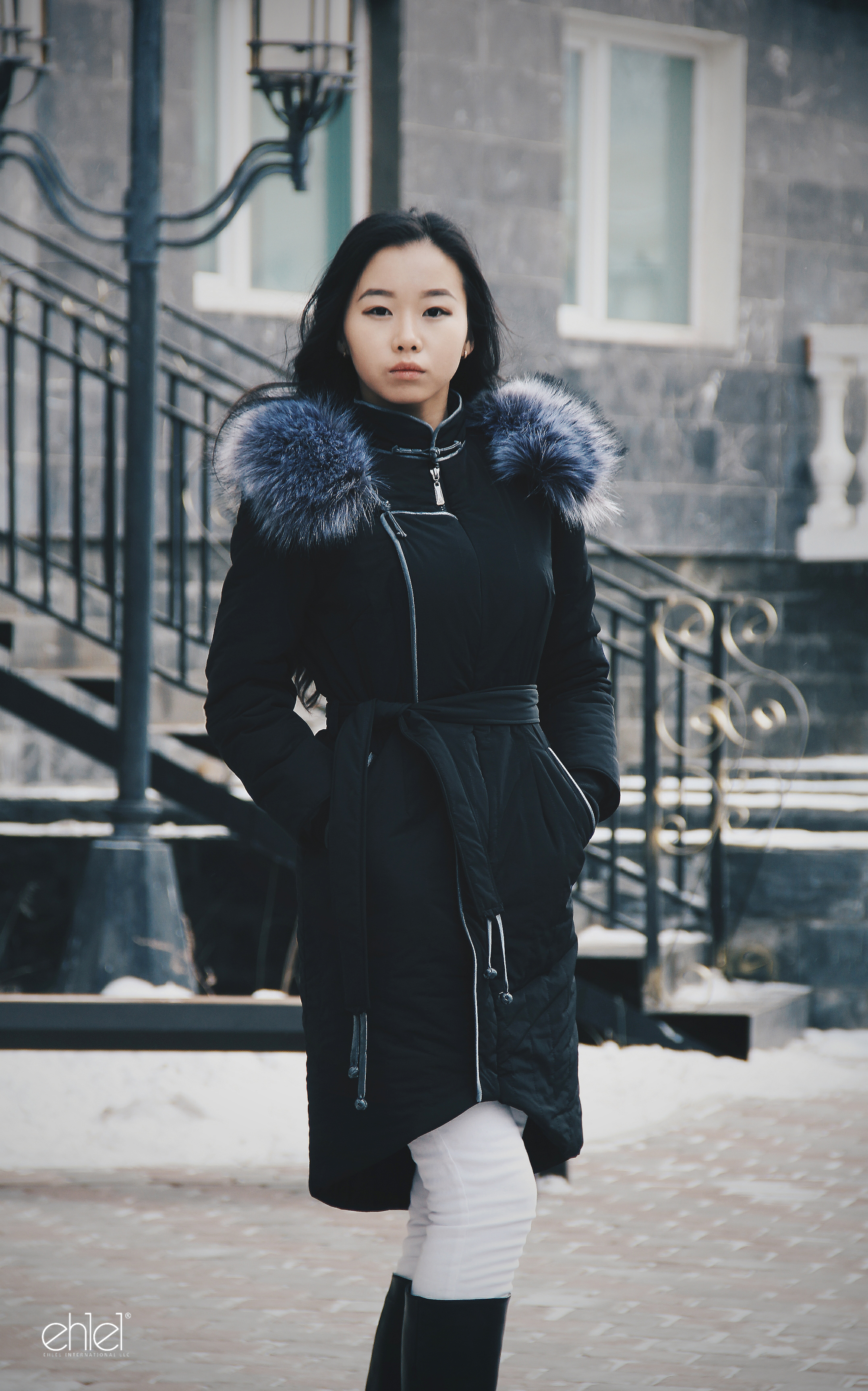 Монгол: Монгол үндэсний хэв маяг бүхий куртик. Монгол улсын Оюуны өмчийн газар 15441 тоот патент